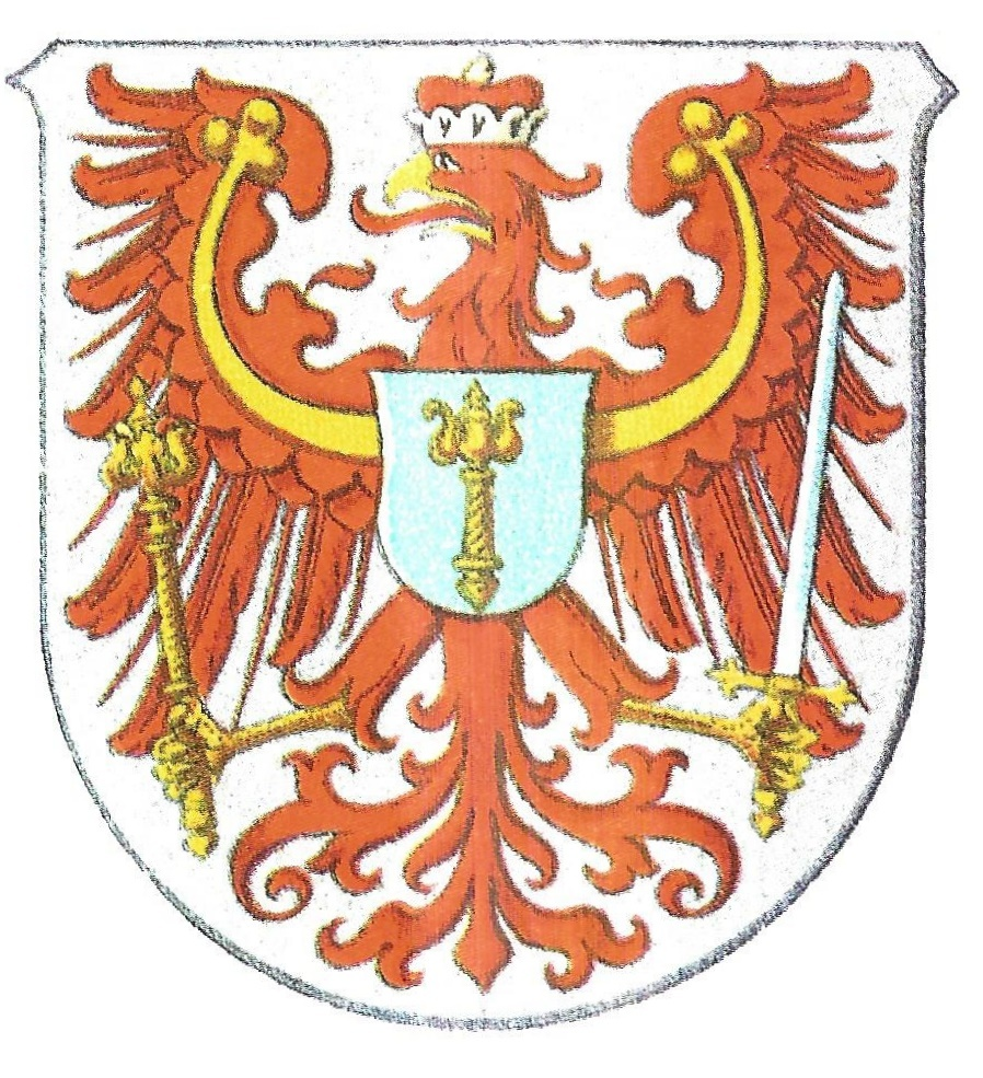 Wappen der Provinz Brandenburg. – Blasonierung: In Silber ein mit Kurfürstenhut gekrönter, goldbewehrter roter Adler mit goldenen Kleetengeln; Zepter und Schwert in den Fängen. Blaues Brustschild mit goldenem Zepter (Erzkämmereramt). – Farben: Rot, Weiß.